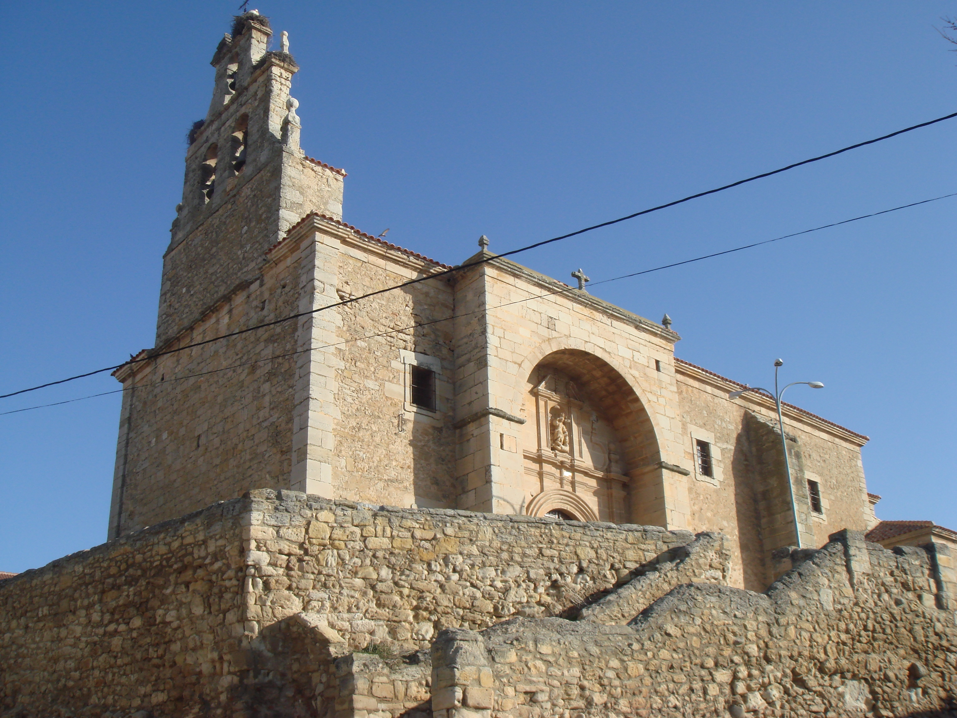 Villalba de Duero, Ribera del Duero, Burgos, Spain, Iglesia de San Miguel